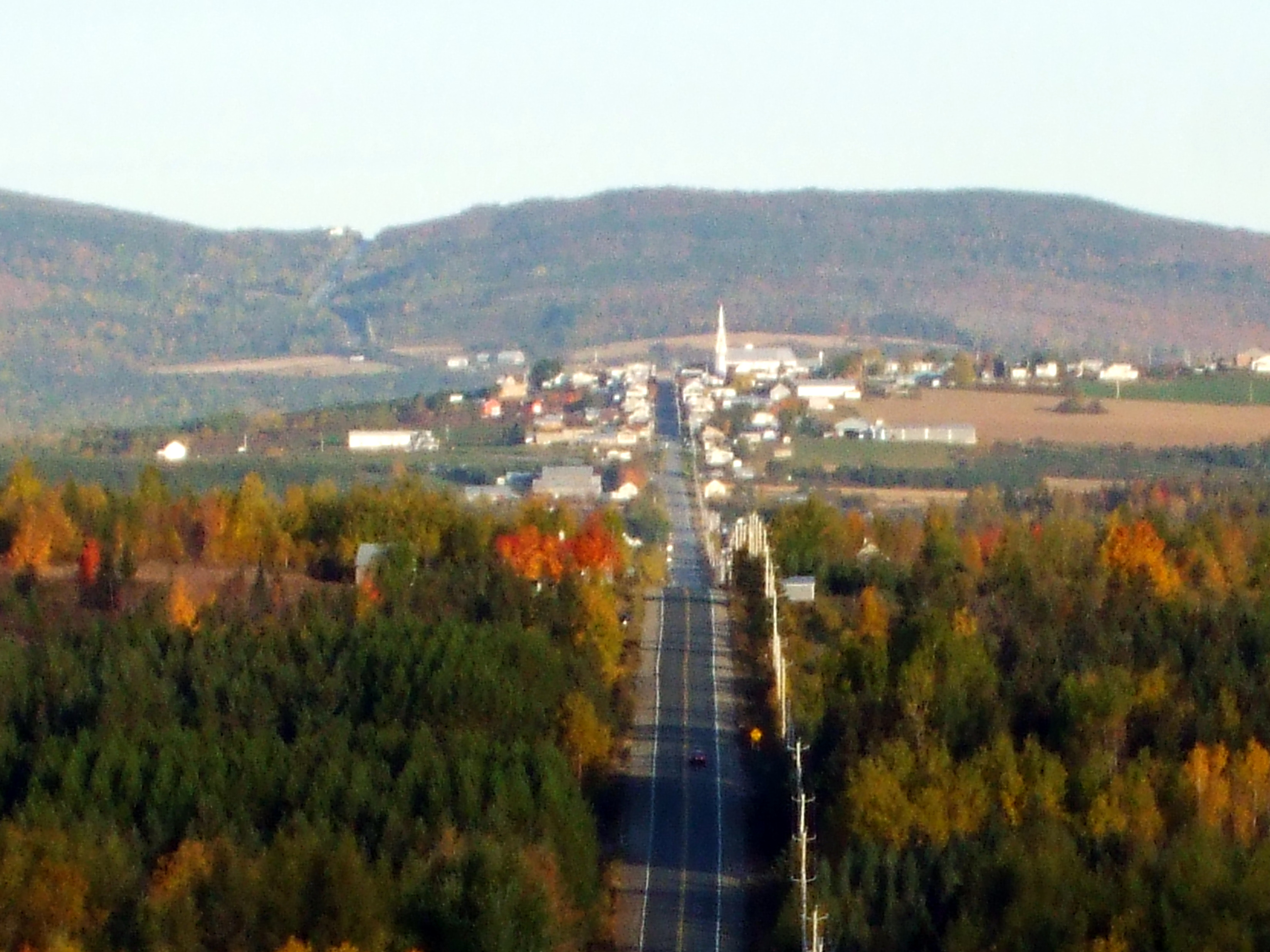 Village de Saint-Magloire, Québec, photo prise de la route 281 nord